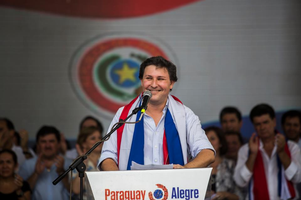 Rafael Filizzola: Campaña por la vicepresidencia año 2013